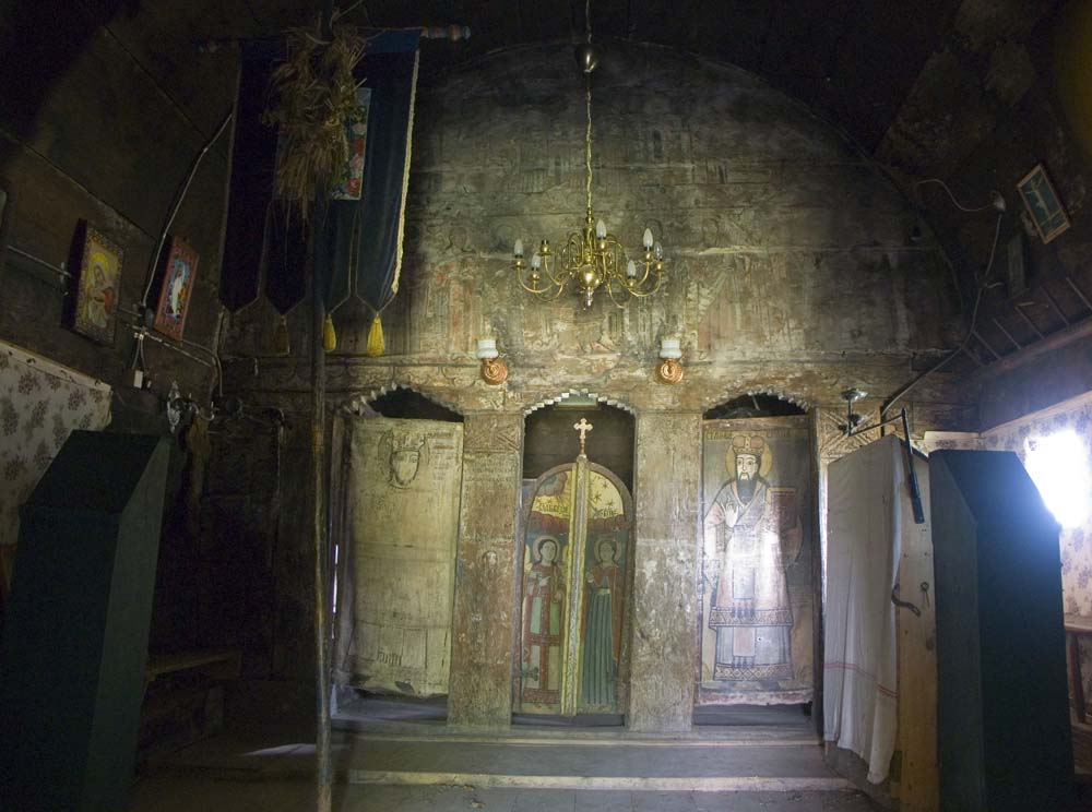 Stânceşti, Bihor, biserica de lemn, interiorul navei, spre iconostas.